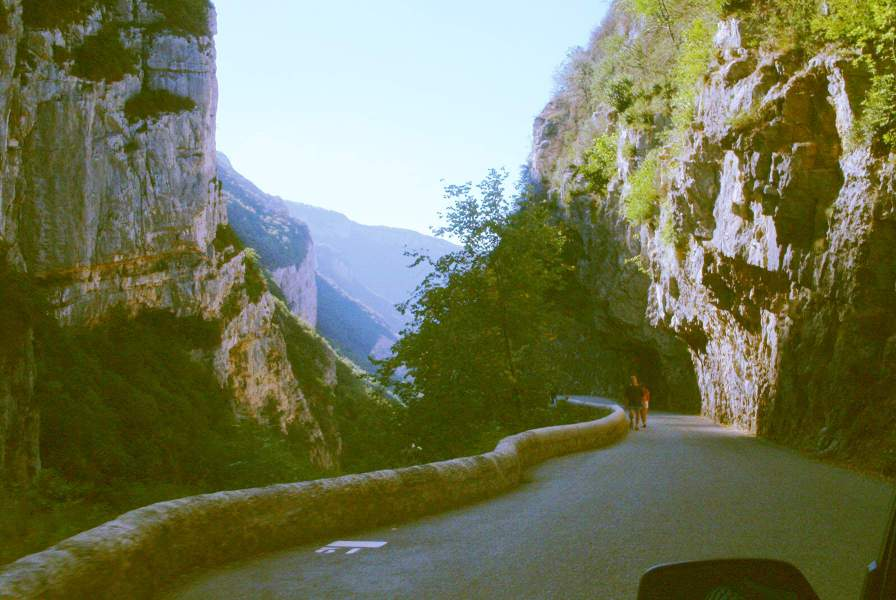 Grands Goulets Route des grands goulets, Massif du Vercors"Grands goulets" road, Vercors Plateau, France